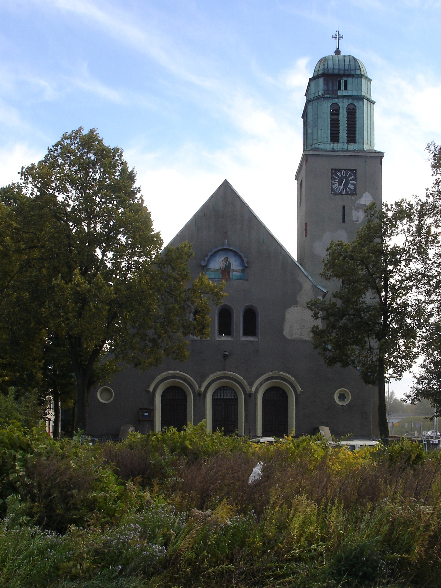 Fasada kościoła św. Józefa w Bytomiu podczas rozbiórki.